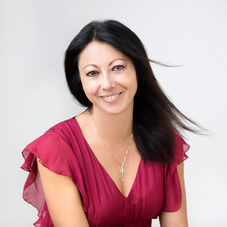 scrittrice italiana